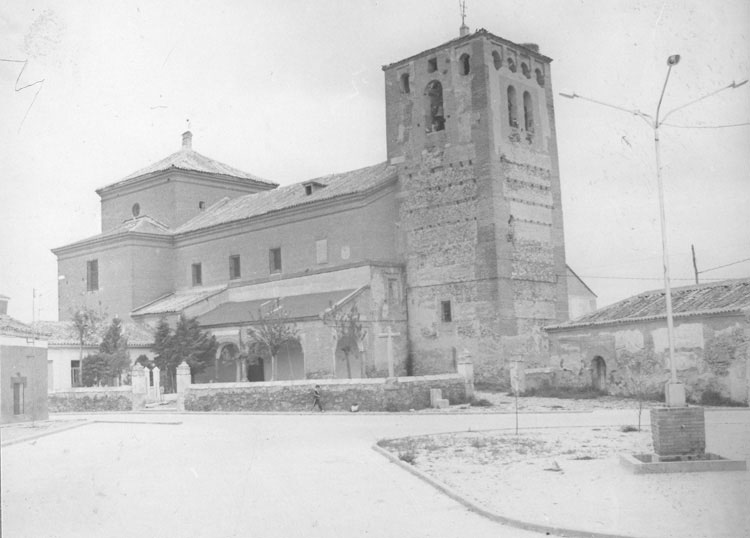 Iglesia parroquial de Nuestra Señora de la Asunción - Lomoviejo (Valladolid) - Álbum 200 x 140 - Fotografía. Papel 115 x 85 B/N